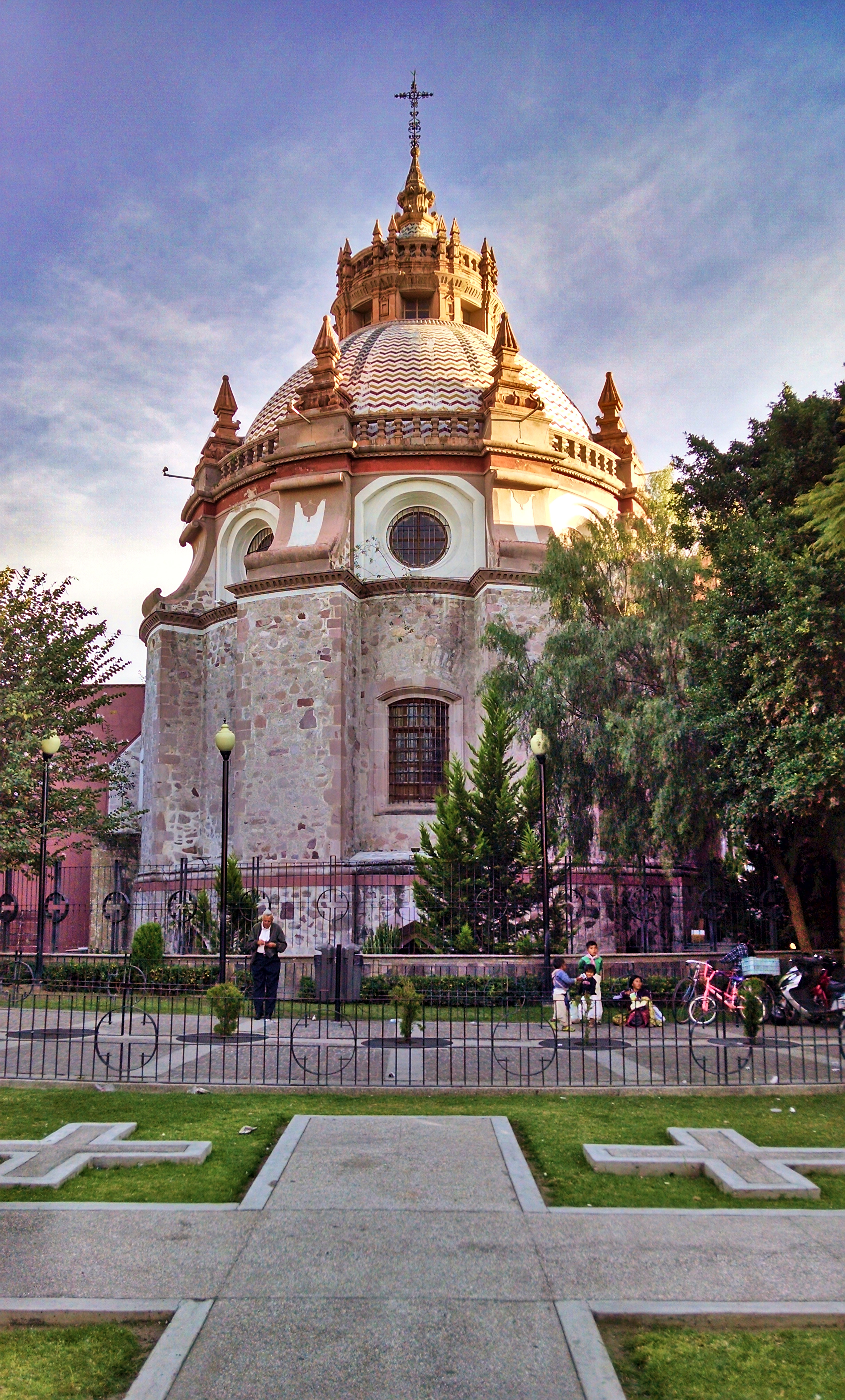 Exterior del Camarín de la Virgen, parte posterior del Templo de San Diego, Aguascalientes, Ags. México